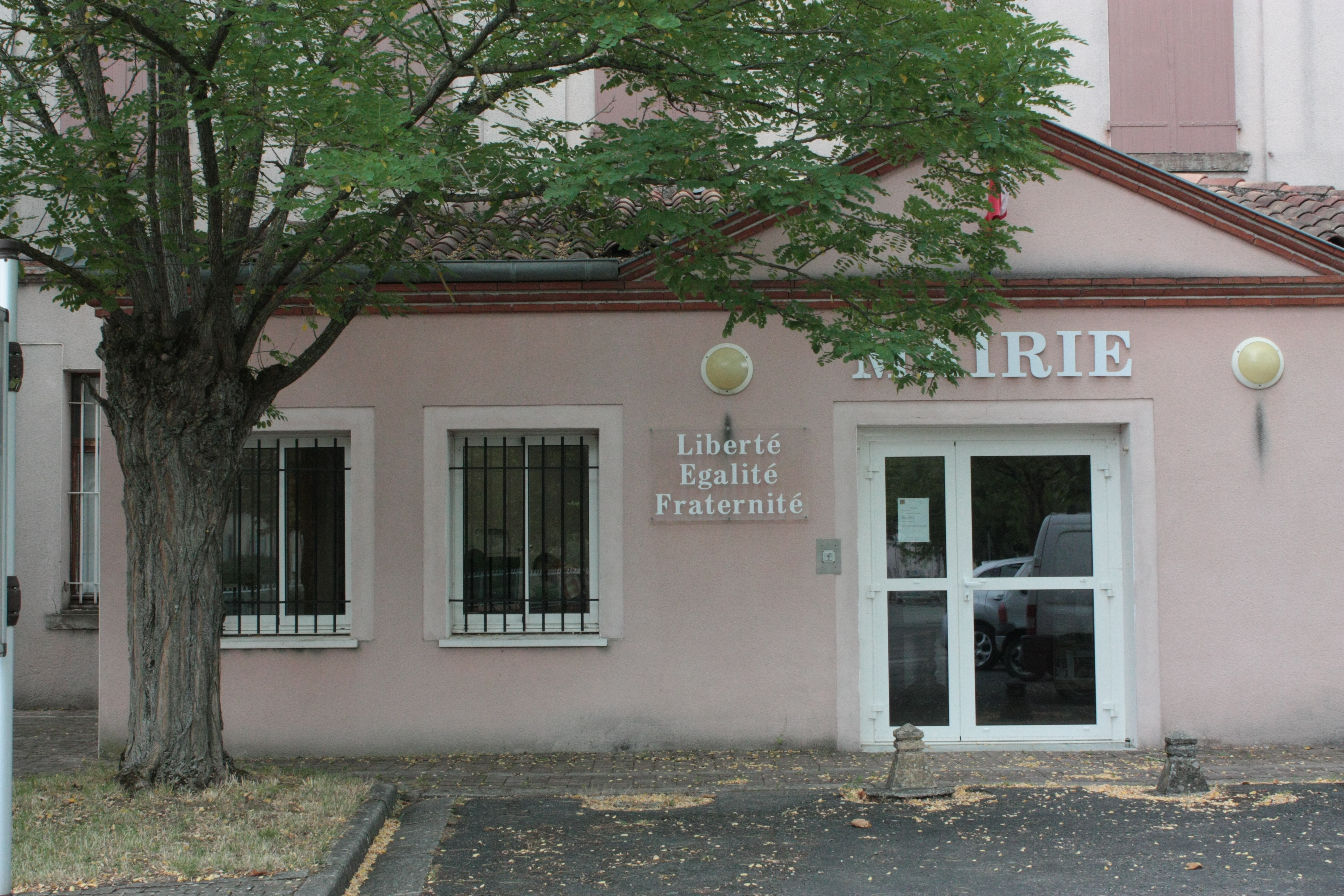 Labastide-de-Lévis : Mairie du village.